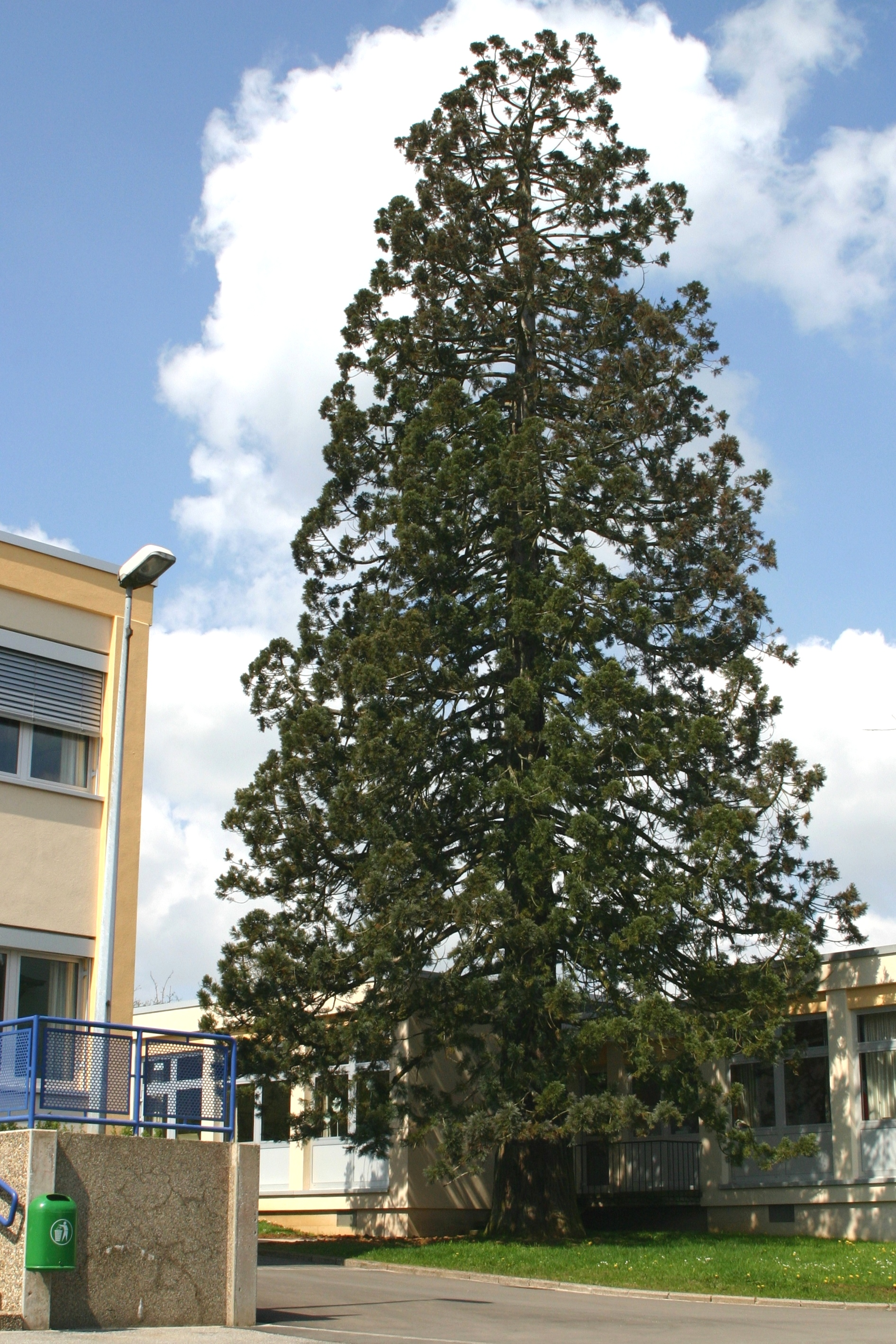 De Mammutbam zu Kënzeg am Schoulhaff.